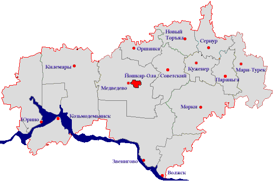 Карта Марий Эл